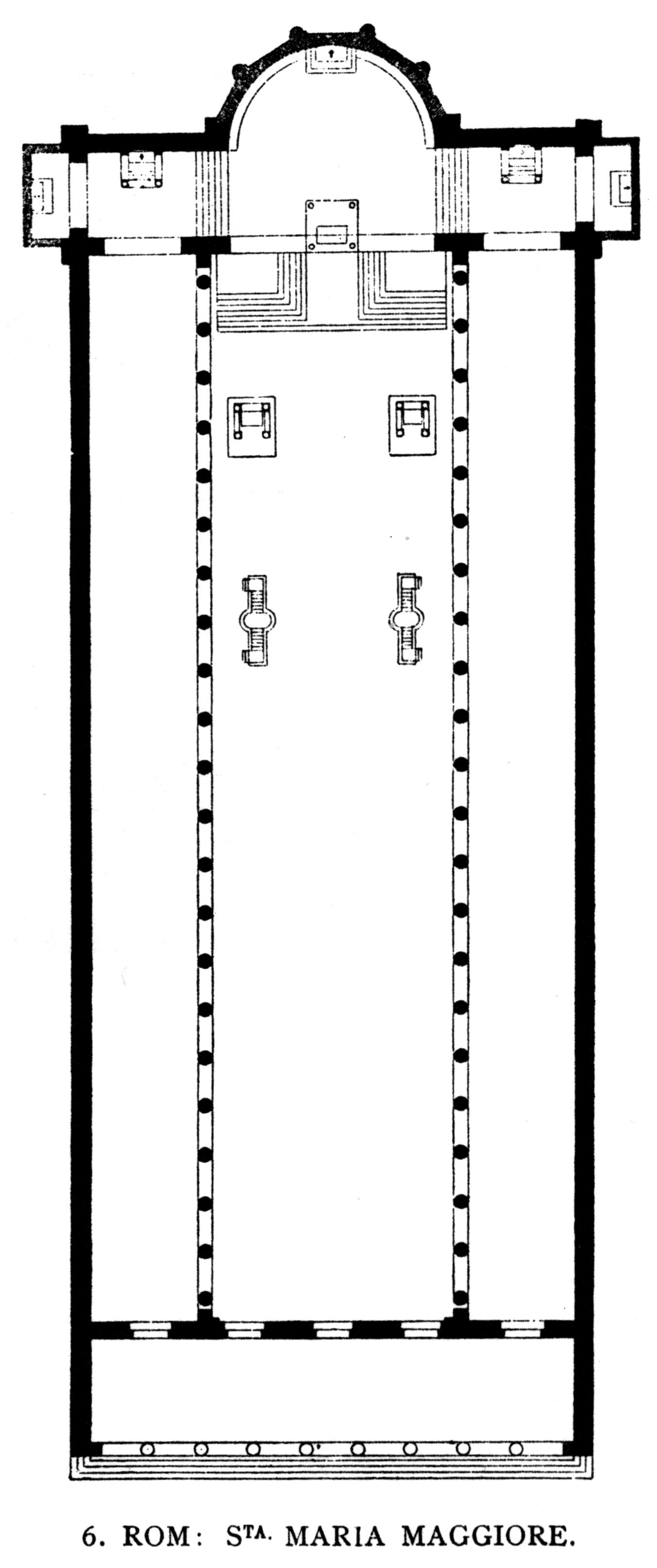 Santa Maria Maggiore, Rome. Floor plan.